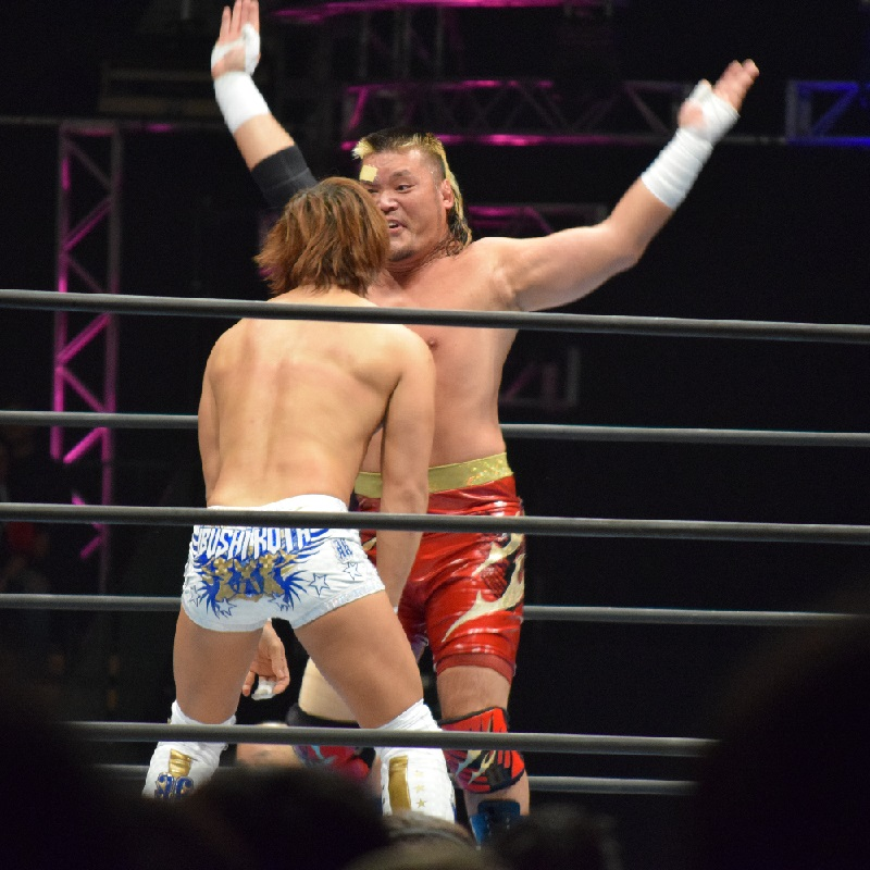 2015年8月1日 大阪府立体育会館 「G1 CLIMAX 25」 飯伏幸太にモンゴリアンチョップを放つ天山広吉